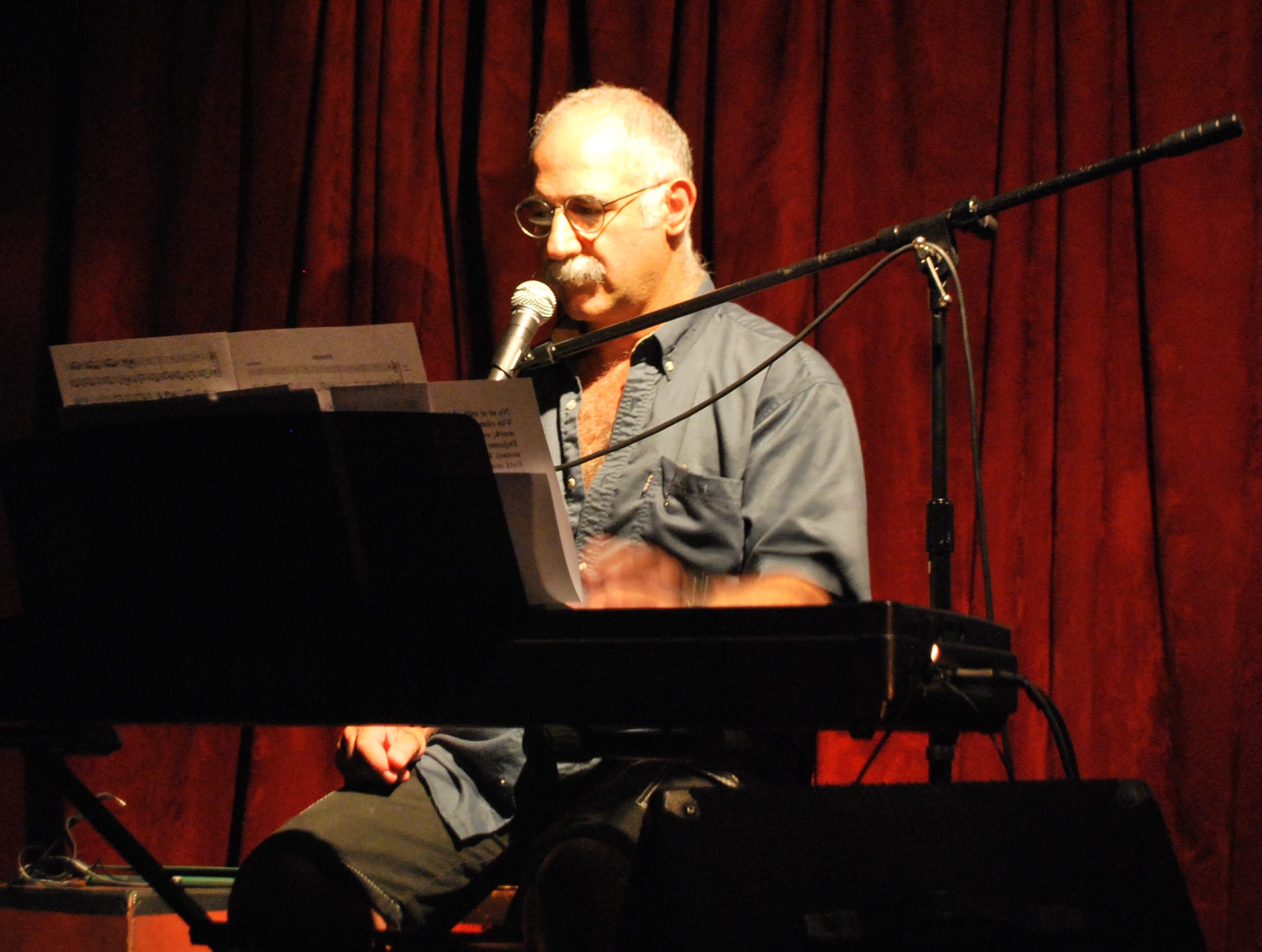 Fotografía del músico Leo Masliah en un espectáculo realizado junto a Riki Musso, titulado "recital de M", brindado en "Espacio Guambia" de Montevideo.